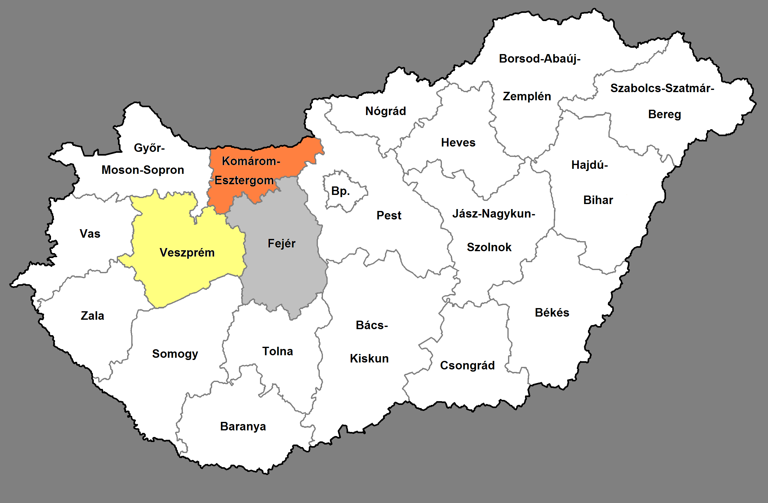 A Közép-Dunántúli régió Magyarországon